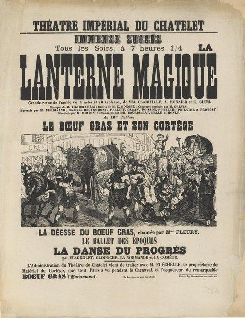 Affiche pour une revue où apparaît le cortège du Bœuf Gras parisien au 10ème tableau.